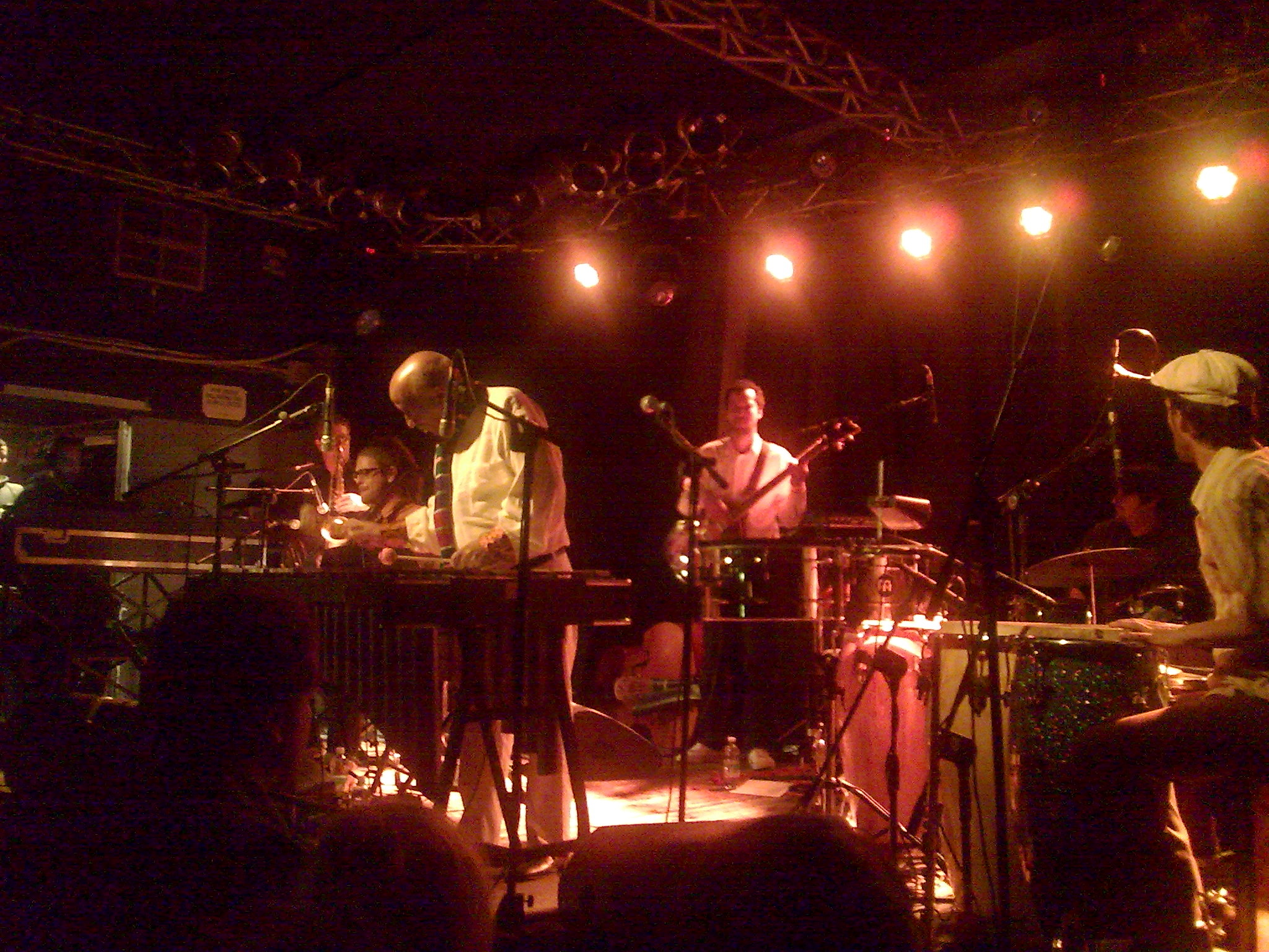 Mulatu Astatke en concert avec The Heliocentrics le 9 mars 2009 au Circolo degli Artisti à Rome